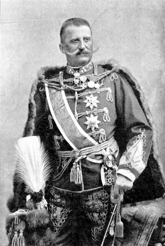 báró Fejérváry Géza (1833–1914) katonatiszt, politikus, miniszter, miniszterelnök portréja. Ellinger Ede fényképfelvétele (1894)